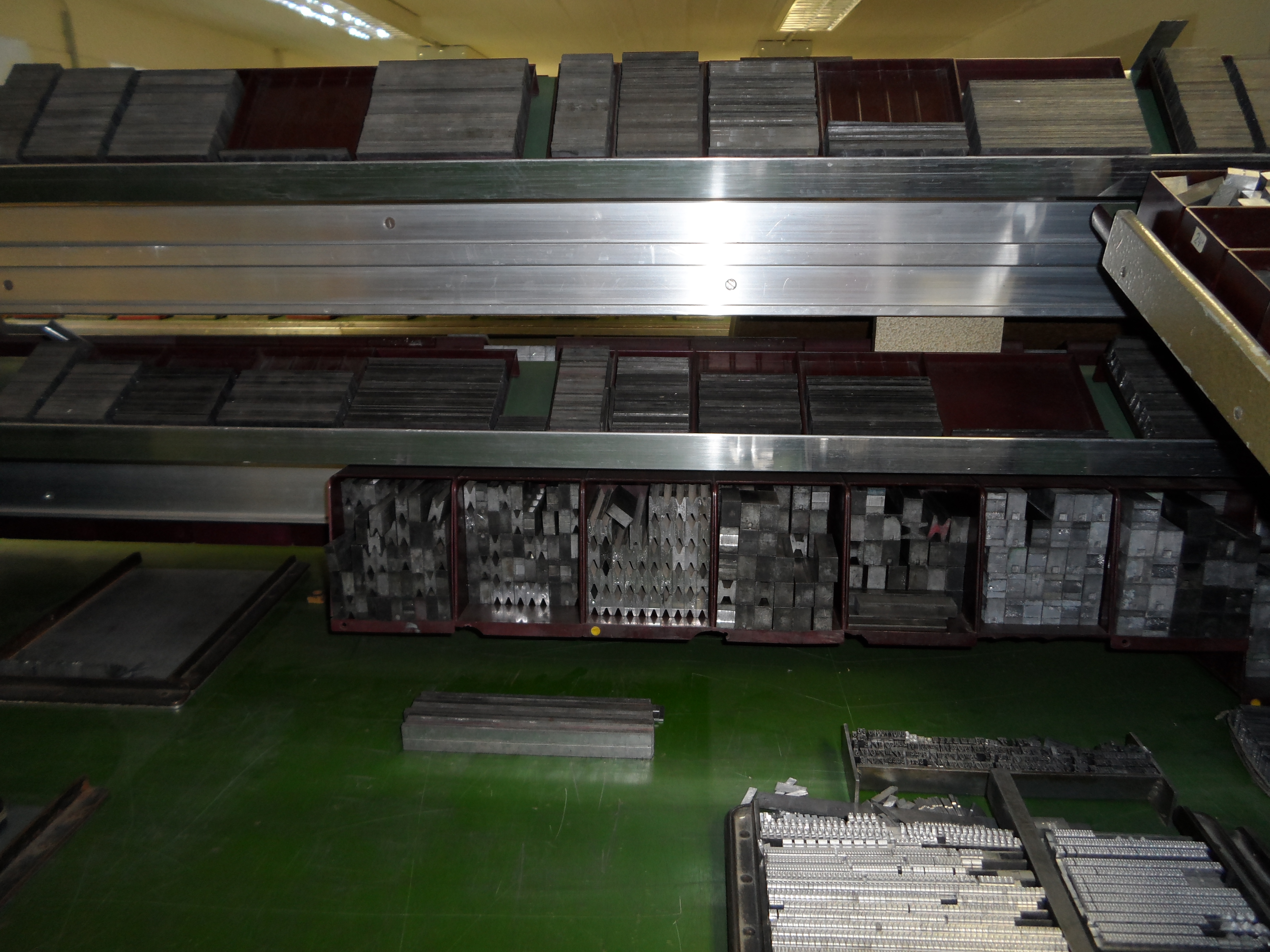 Blindmaterial im Handsatz